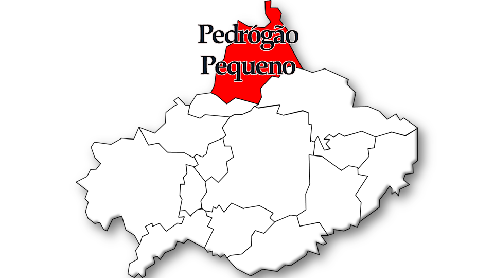 População